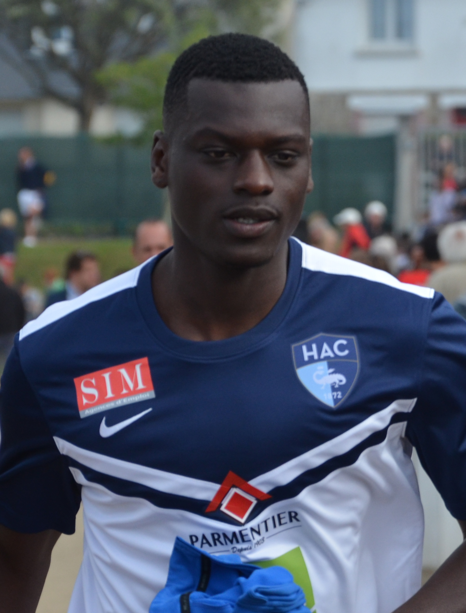 Photographie prise lors du match opposant le Stade rennais au Havre AC en amical au stade Paul-Audrin de Dinard le 8 juillet 2015. Ici, Joseph Mendes.